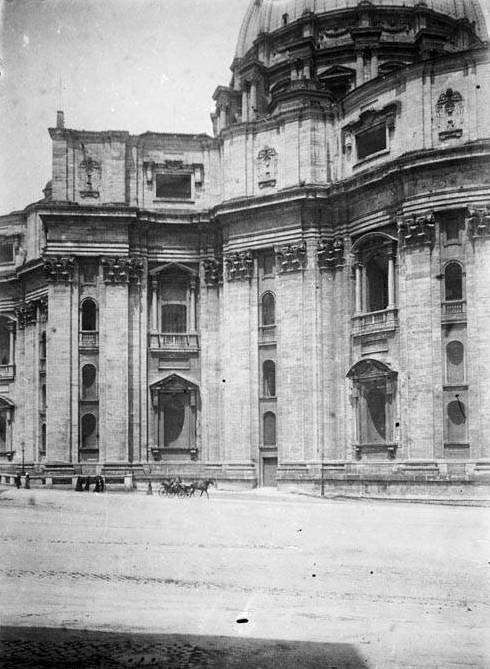 Imatge